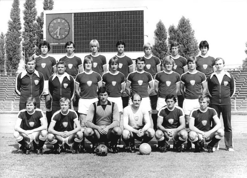 ADN-ZB-H.P. Beyer-8.9.79-ma-Dresden: Fußball-Europapokal der Landesmeister 1979-80. DDR-Teilnehmer: BFC Dynamo. In der oberen Reihe von links: Bernd Brillat, Bernhard Jonelat, Rainer Ernst, Bernd Schulz, Hans-Jürgen Riediger, Hartmut Pelka und Rainer Troppa. Mittlere Reihe von links: Trainer Jürgen Bogs, Assistenztrainer Martin Skaba, Norbert Trieloff, Roland Jüngling, Arthur Ulrich, Rals Strässer, Detlef Helms und Masseur Harry Tost. Untere Reihe von links: Michael Noack, Wolf-Rüdiger Netz, Bodo Rudwaleit, Rainer Schwerdtner, Reinhard Lauck und Mannschaftskapitän Frank Terletzki.